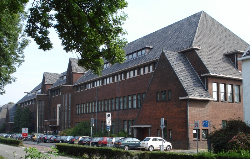 Rijksmonument 506630 - Kweekschool Immaculata, Brusselseweg 150, Maastricht